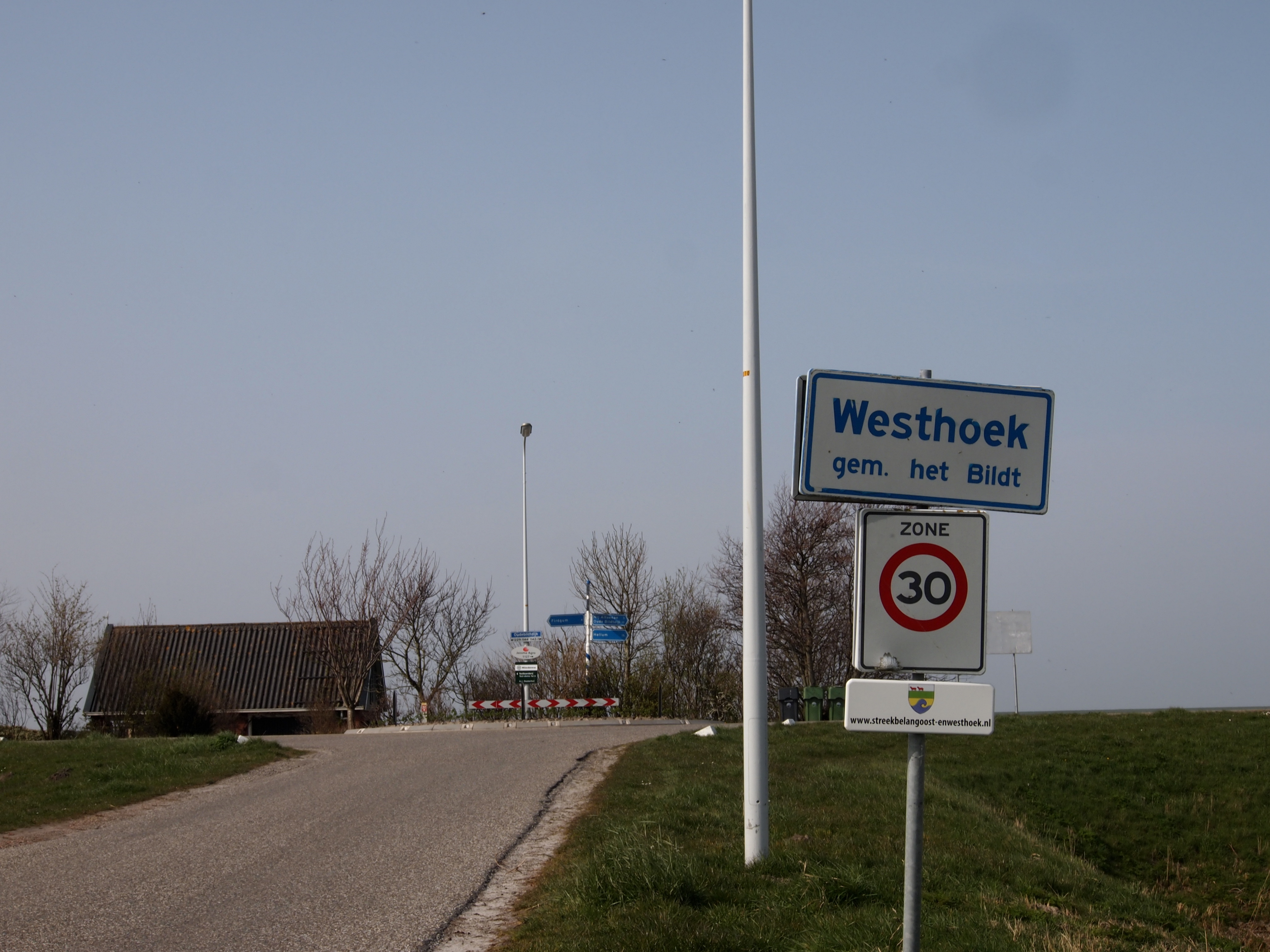 Buurtschap Westhoek